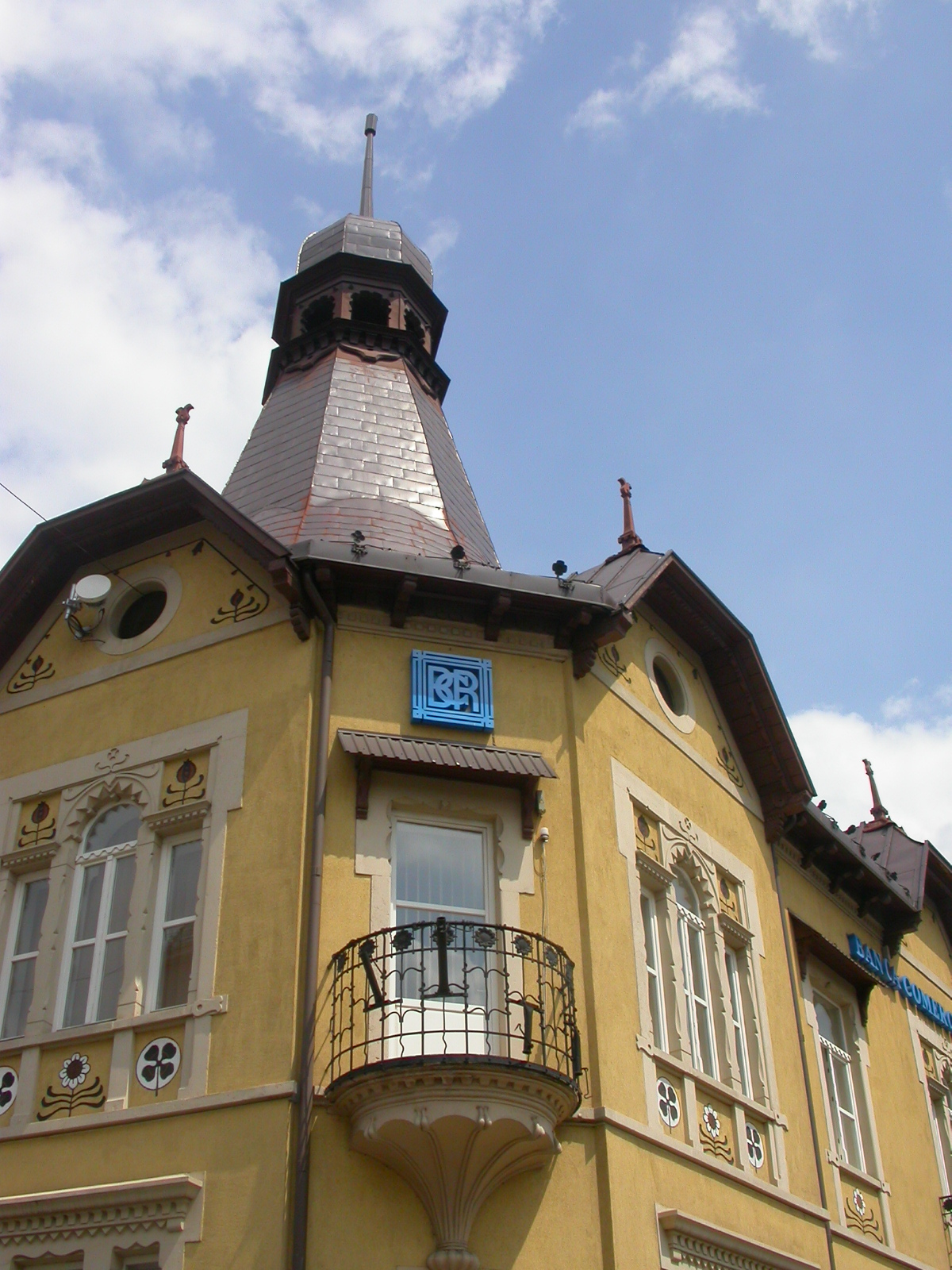 Fosta Bancă Agrară, azi Banca Comercială, 1909, ext.1930 - 1940